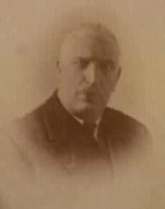 Ritratto di Vincenzo Cordova